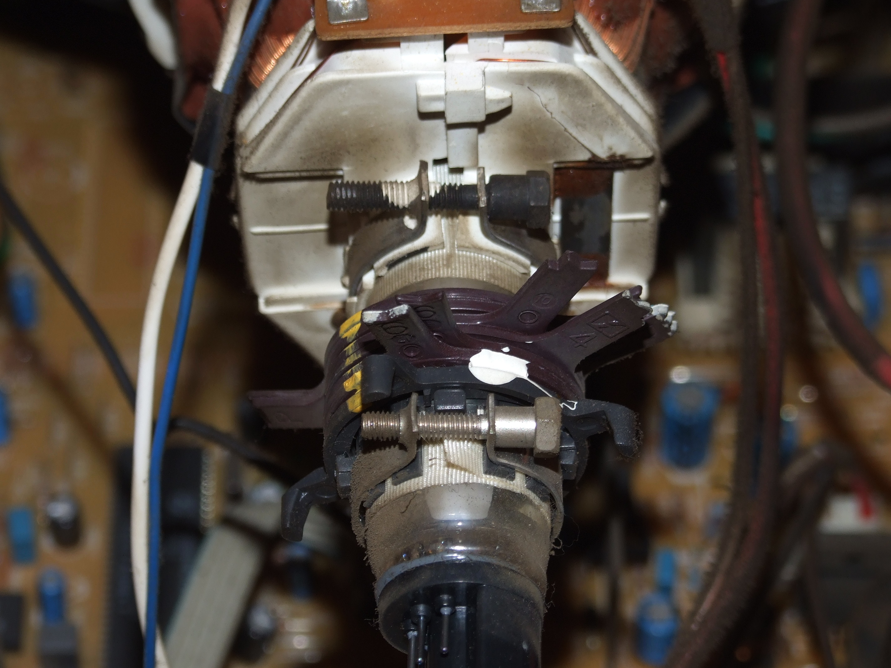 Regler zum Abgleich der Konvergenz an einem Fernsehgerät.